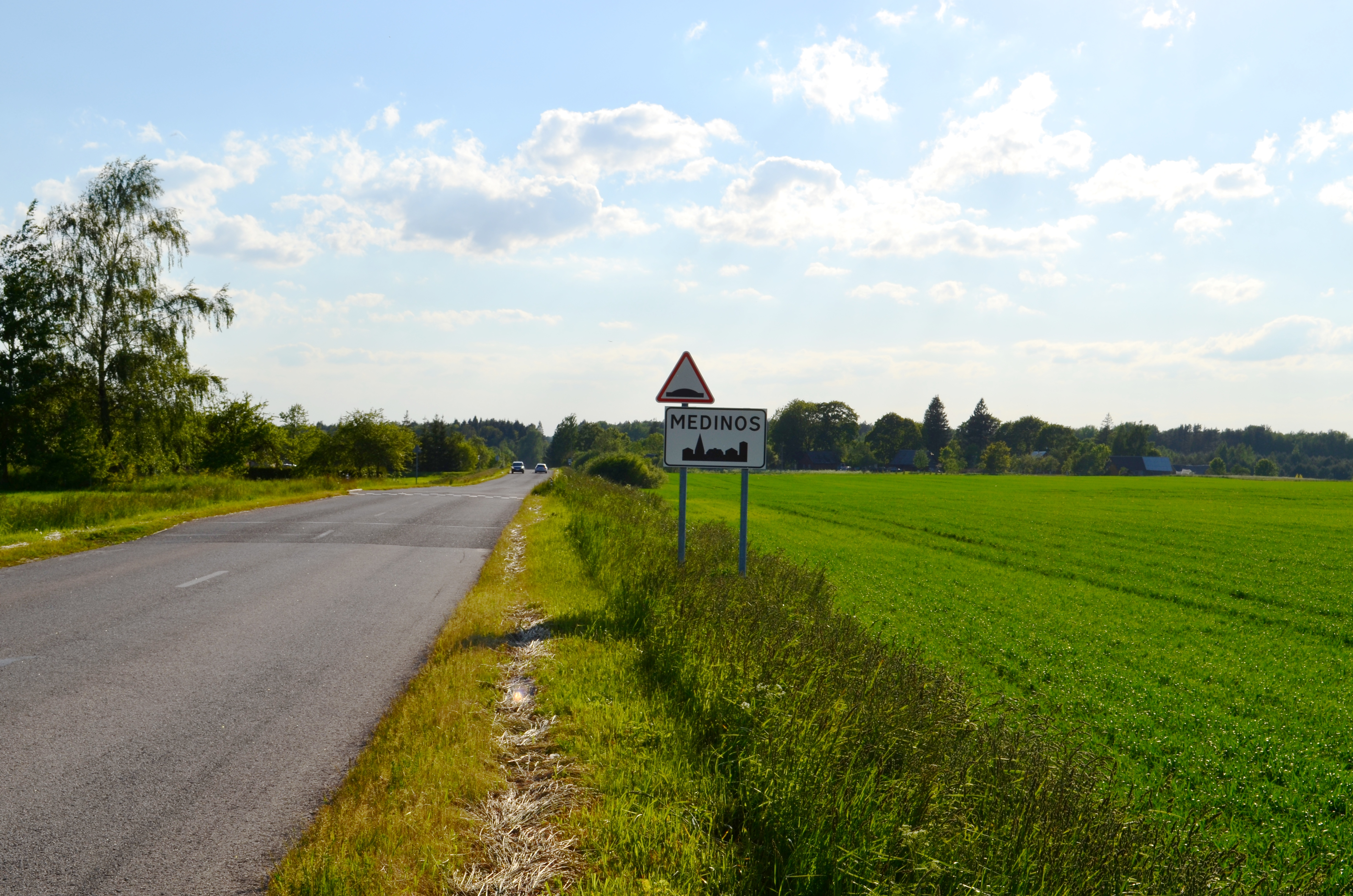 Medinos, Ukmergės raj.